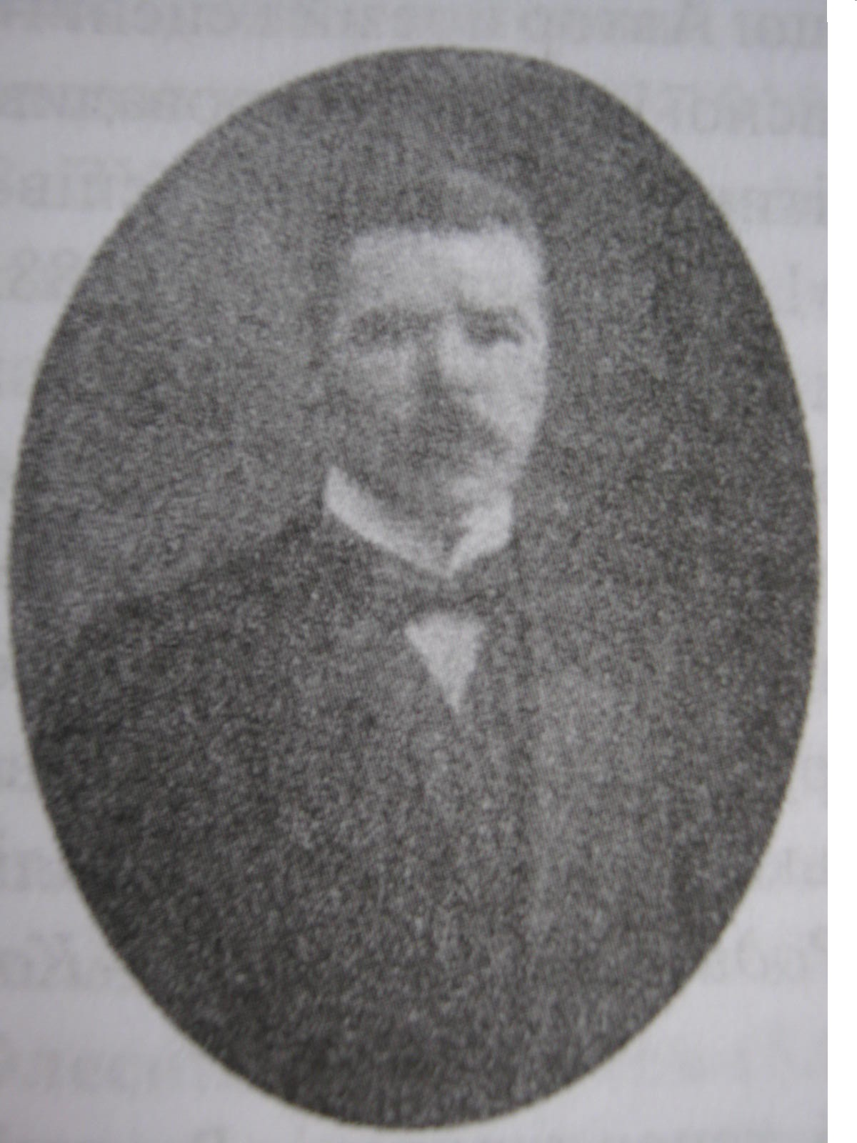 Михайло Новаківський